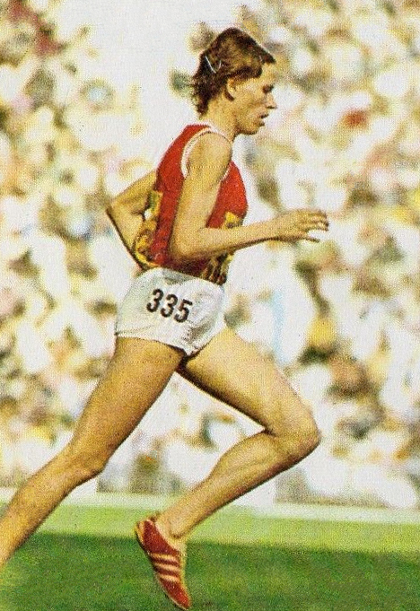 CAMPIONI dello SPORT 1973/74-Figurina n.16- BRAGINA - URSS -ATL.LEGGERA